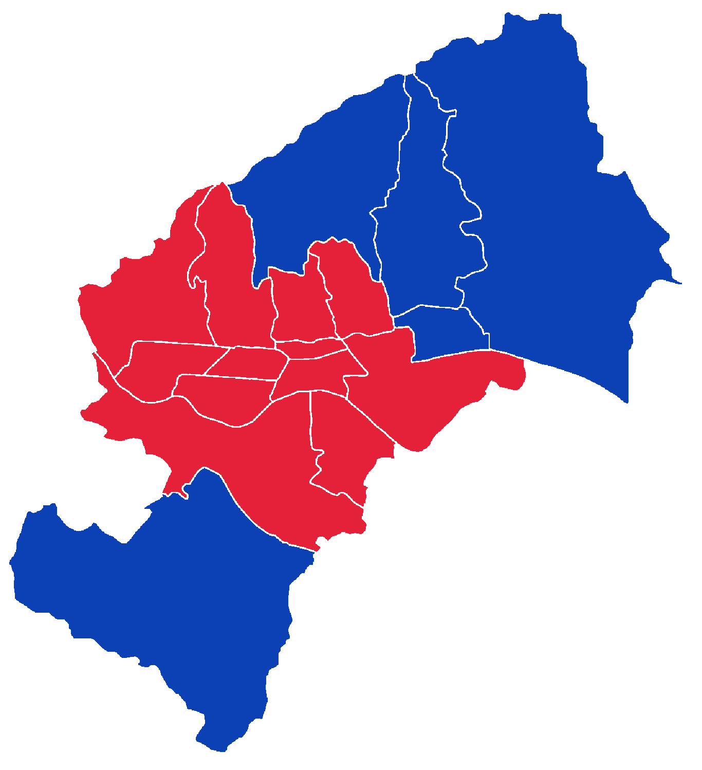 Izbori za vijeća gradskih četvrti u Zagrebu 2013